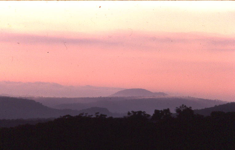 mountains, australia